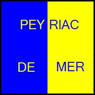 Couleur, Peyriac-de-Mer